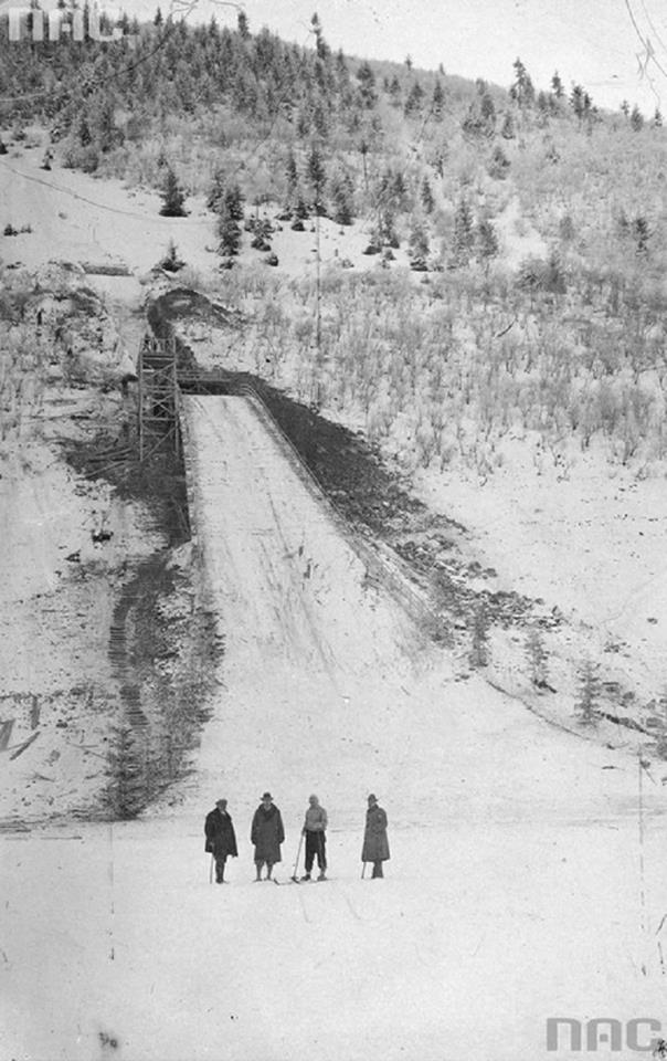 Skocznia w Szczawnicy, w okolicach czasu otwarcia